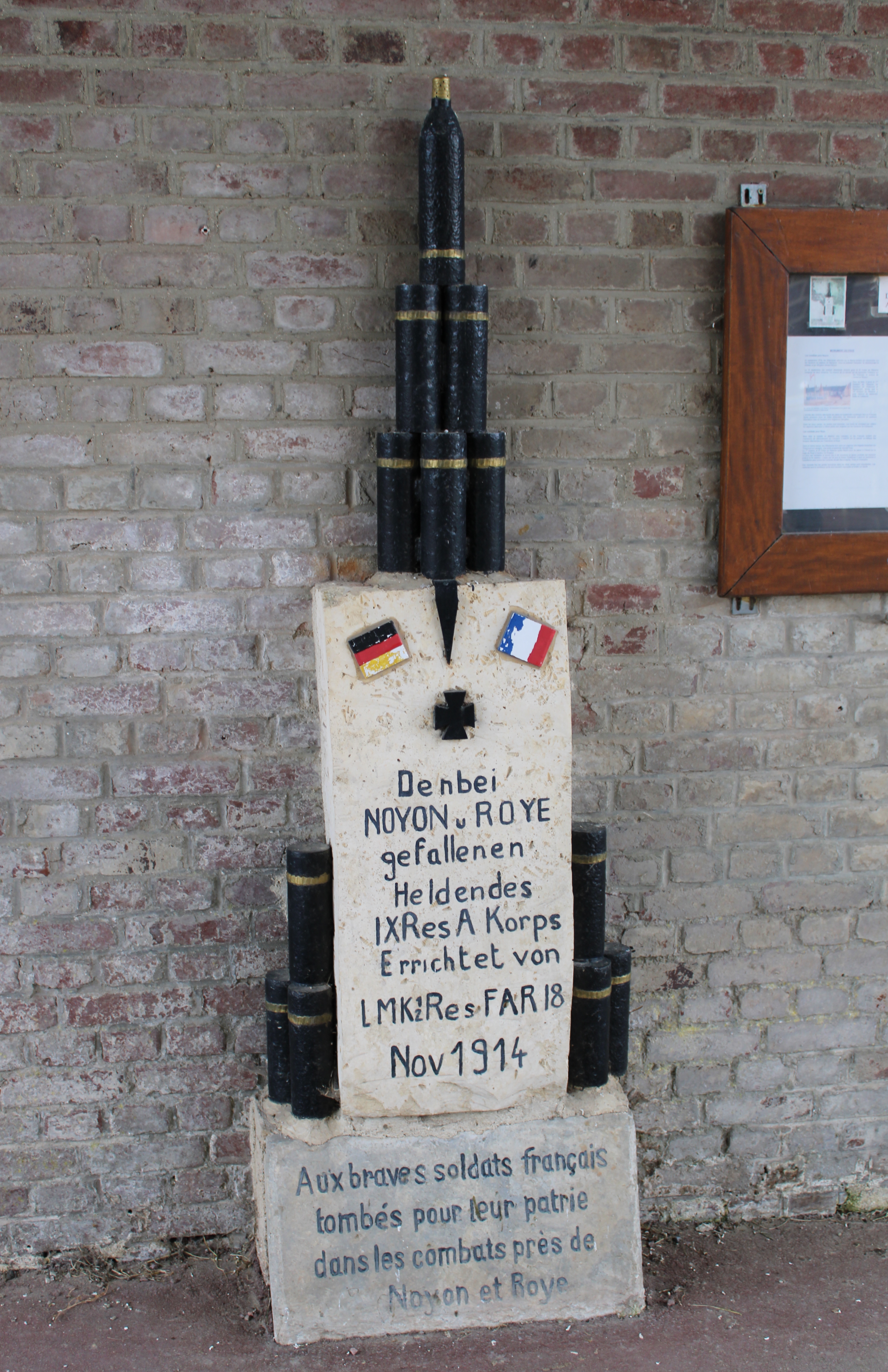 Vestiges d'une stèle élevée par les soldats allemands pour honorer le courage des soldats français